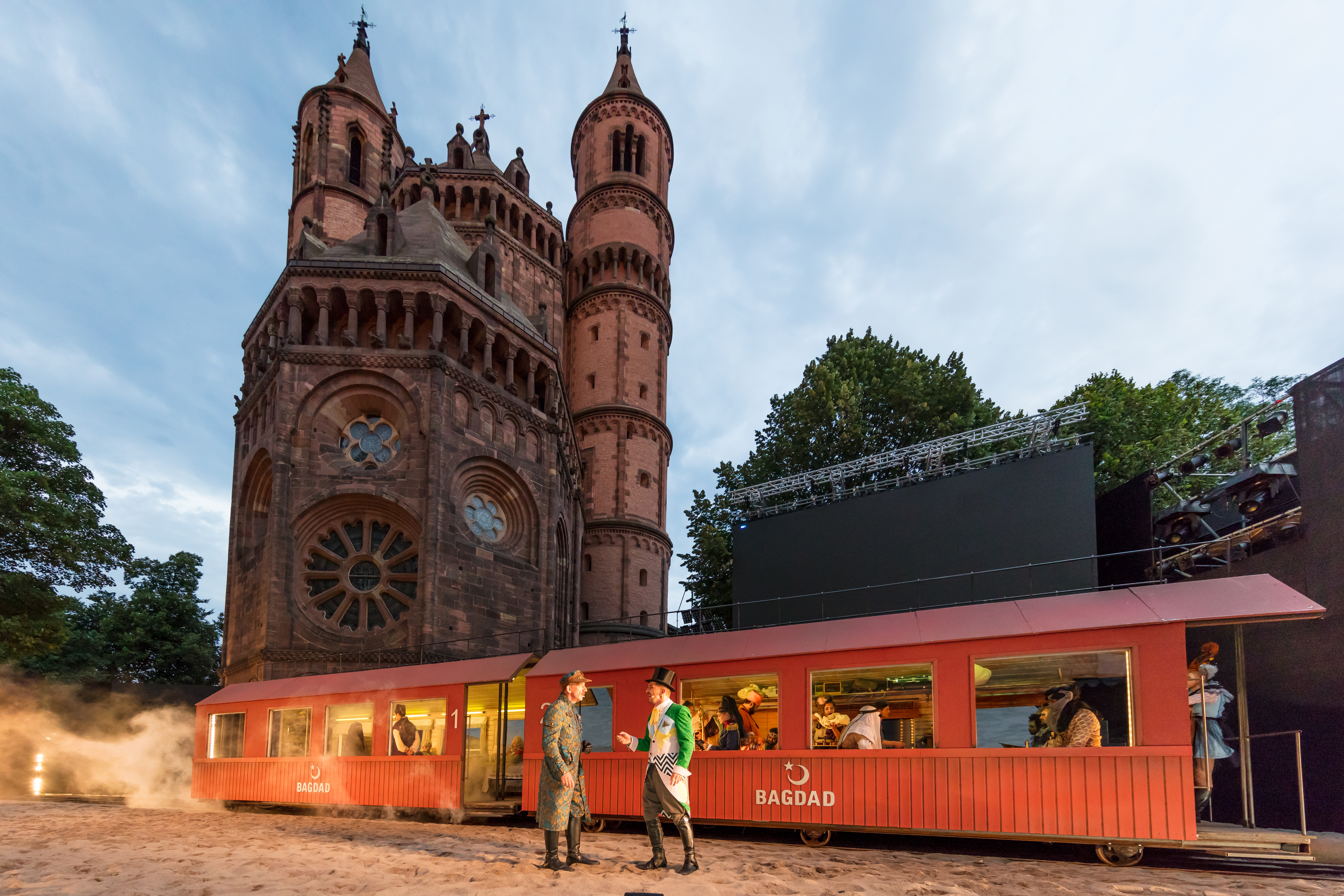 Miscellaneous during Nibelungenfestspiele "GLUT. Siegfried von Arabien." at Rheinland-Pfalz, Worms, , Germany on 2017-08-01, Photo: Sven Mandel